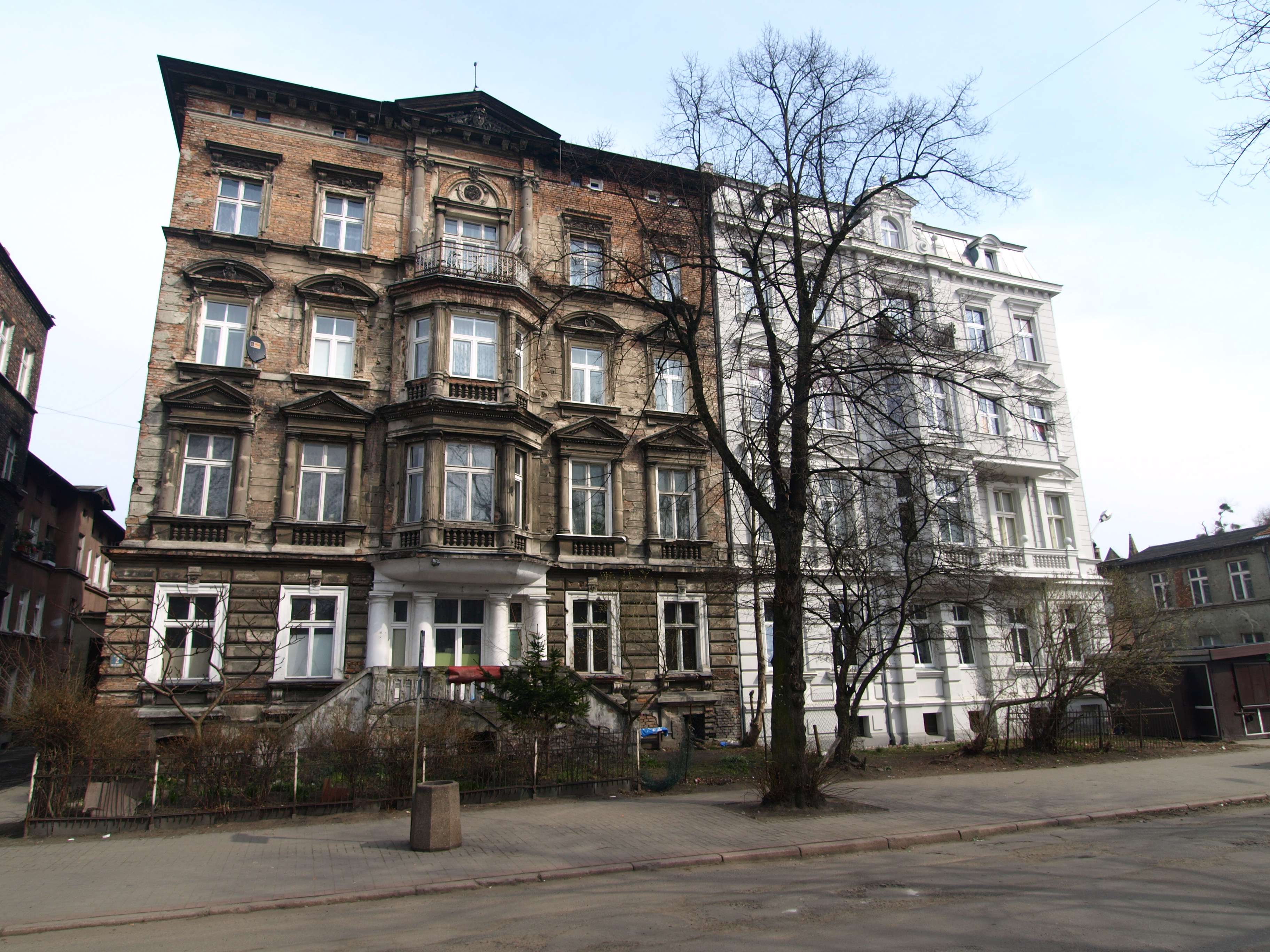 Kamienice na Dolnym Mieście w Gdańsku (z lewej kamienica przy ul. Śluzy 2, z prawej kamienica narożna przy ul. Łąkowej 34).